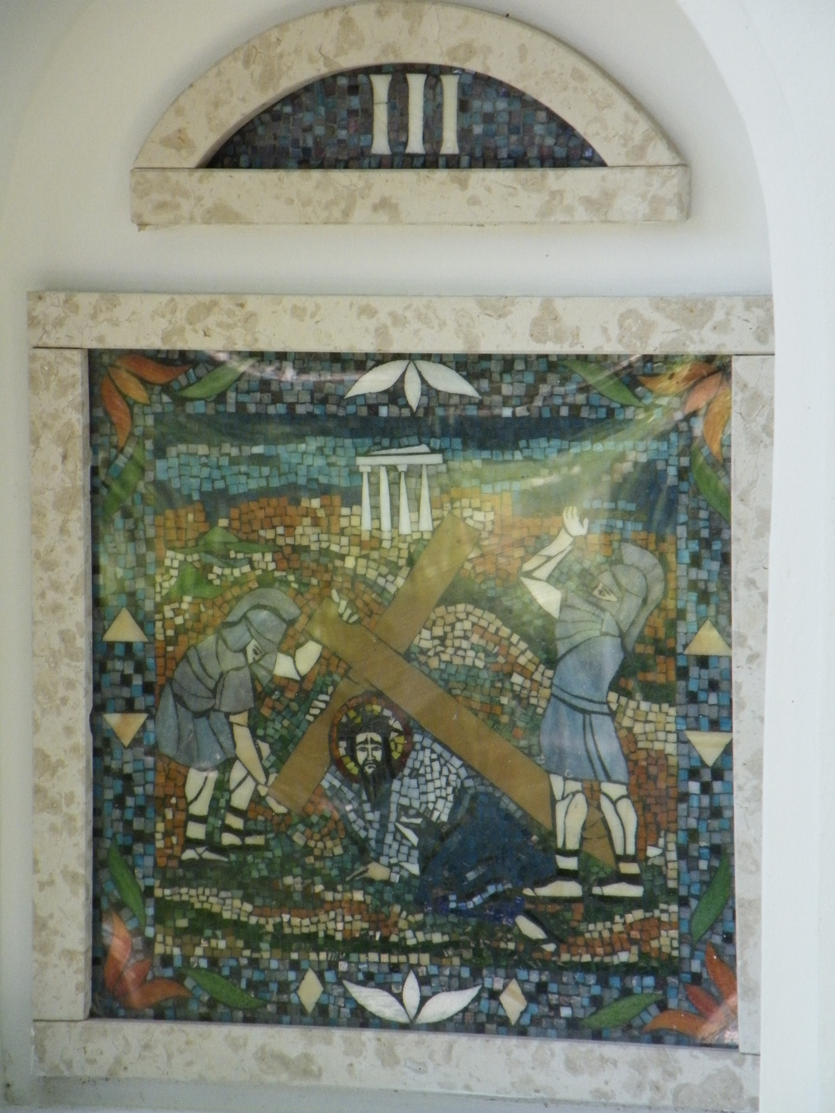 Stációk a Palóc ligetben, Balassagyarmaton